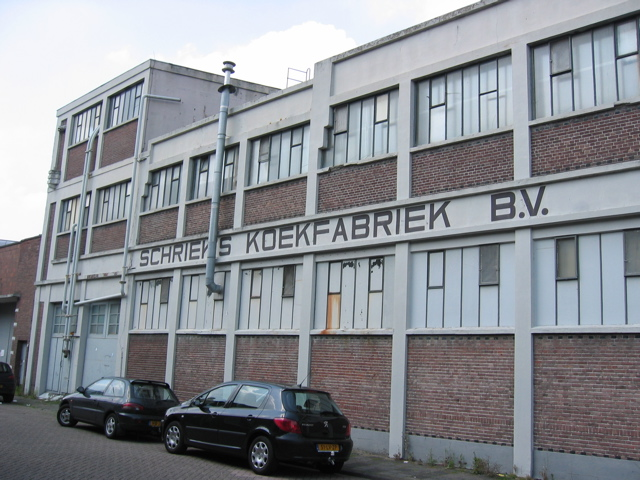 Gemaakt in 2004 door auteur van het artikel, bewoner van het complex.